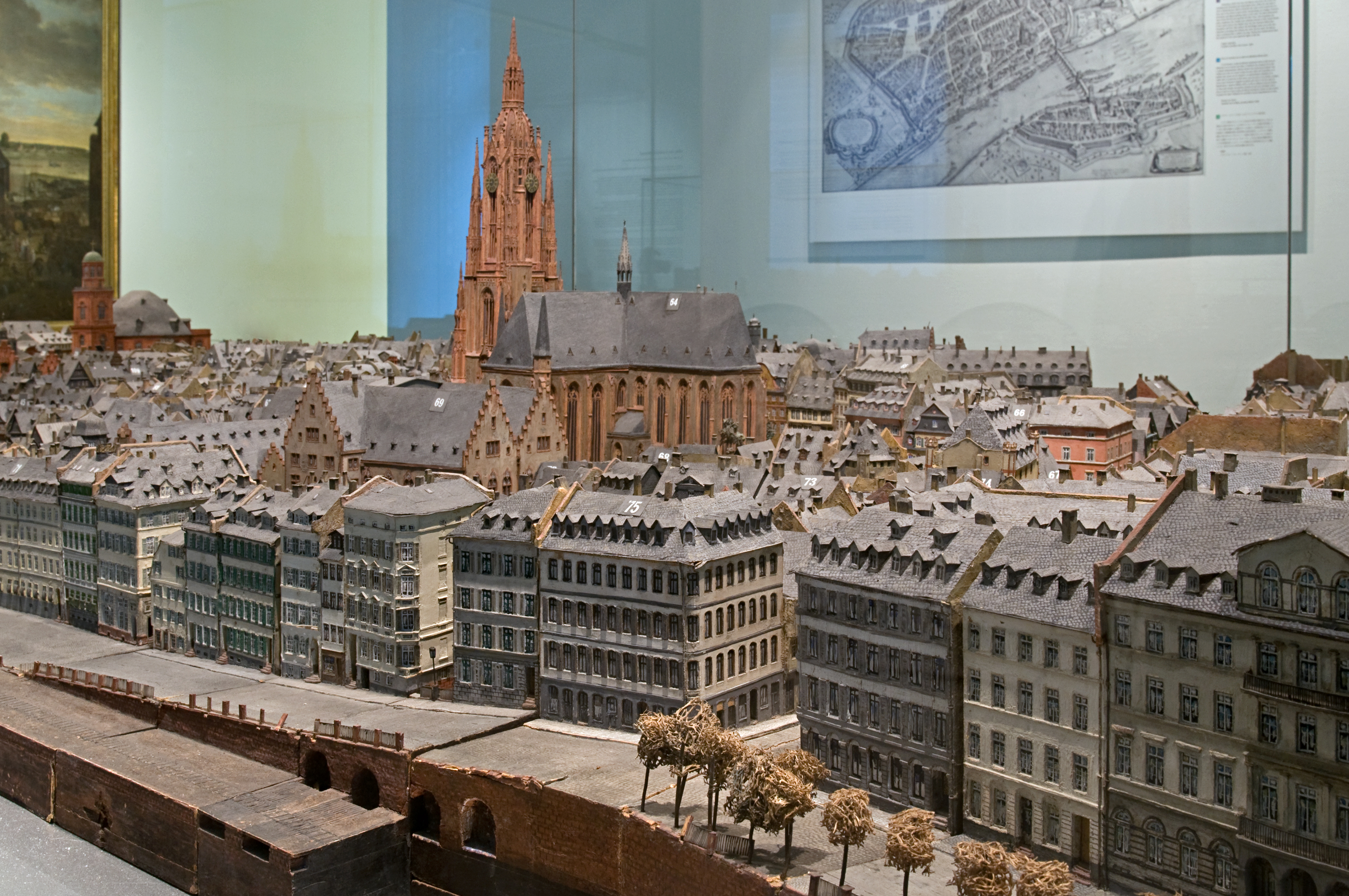 Historisches Museum Frankfurt am Main Altstadtmodell der Brüder TreunerMainufer am Mainkai mit kleinteiligen Stadthäusern vor dem II. Weltkrieg und Rampe zur Alten Brücke, dahinter der Dom.